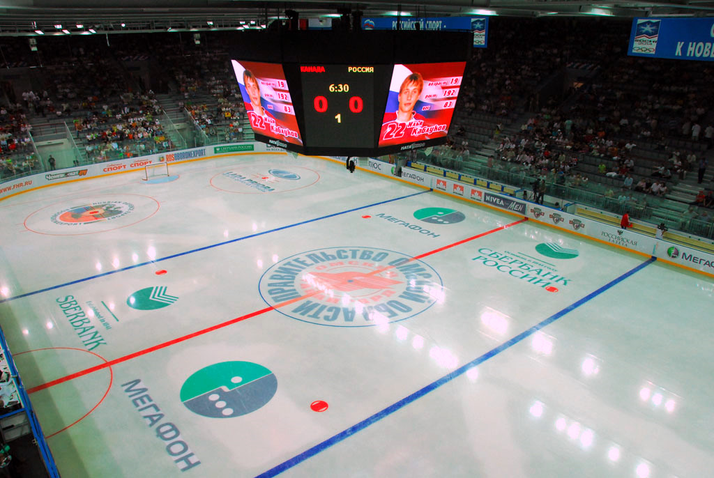 pohľad na omsk arenu